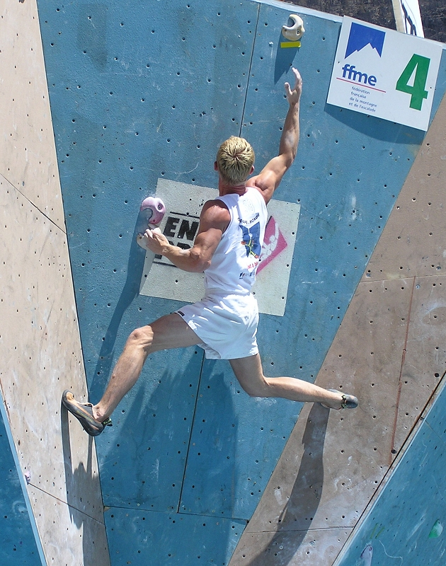 Jure Golob.